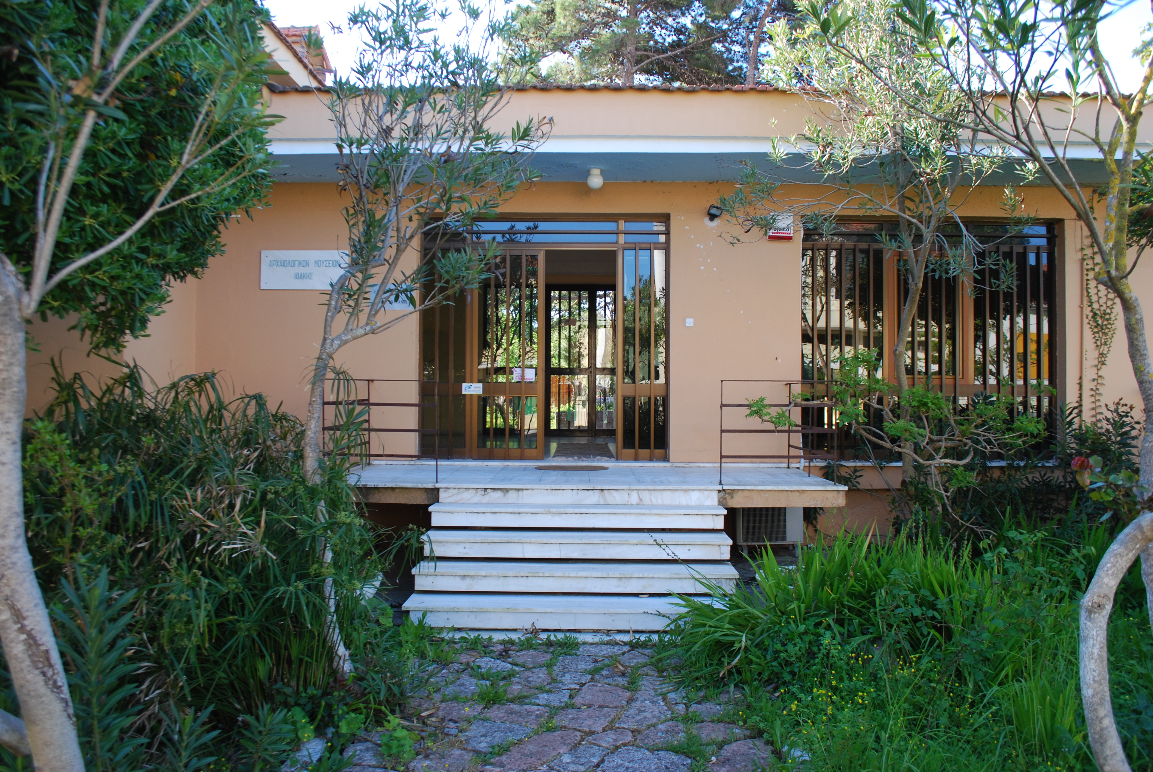 Vue d'Ithaque.